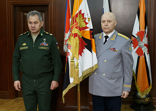 Министр обороны Российской Федерации генерал армии Сергей Шойгу вручил личный штандарт начальника Главного управления Генерального штаба Вооруженных Сил Российской Федерации генерал-лейтенанту Игорю Коробову